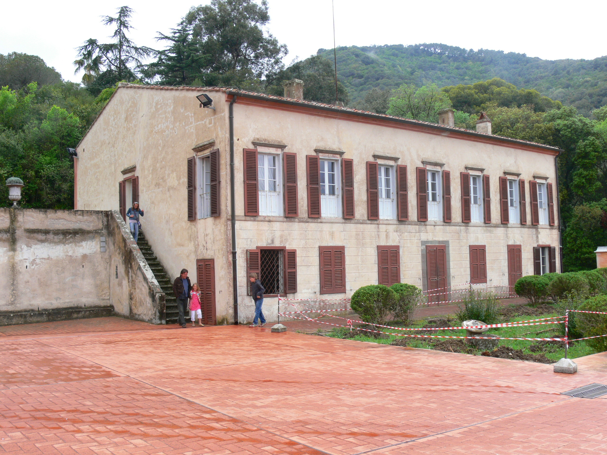 San Martino on Elba. Napoleon´s summer villa.